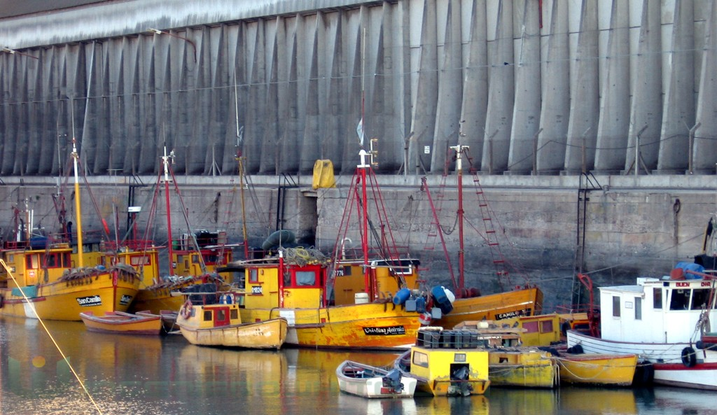 Foto del Puerto Artesanal de Ingeniero White